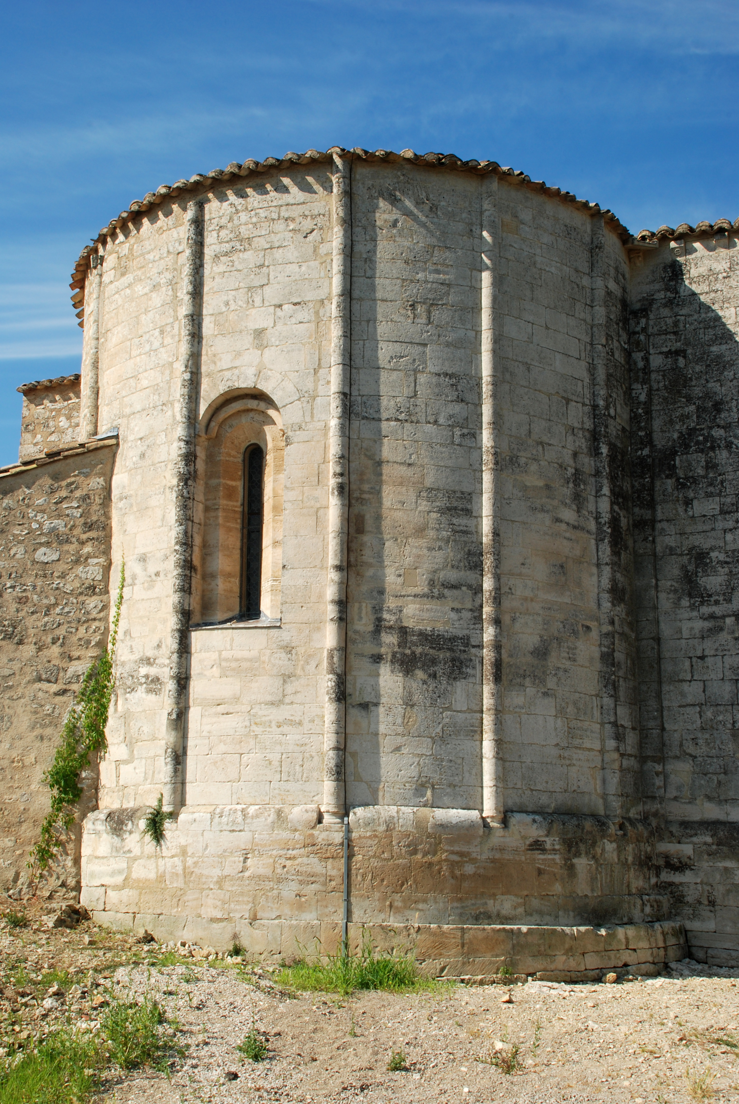 France - Languedoc - Hérault - Église de Saint-Vincent-de-Barbeyrargues